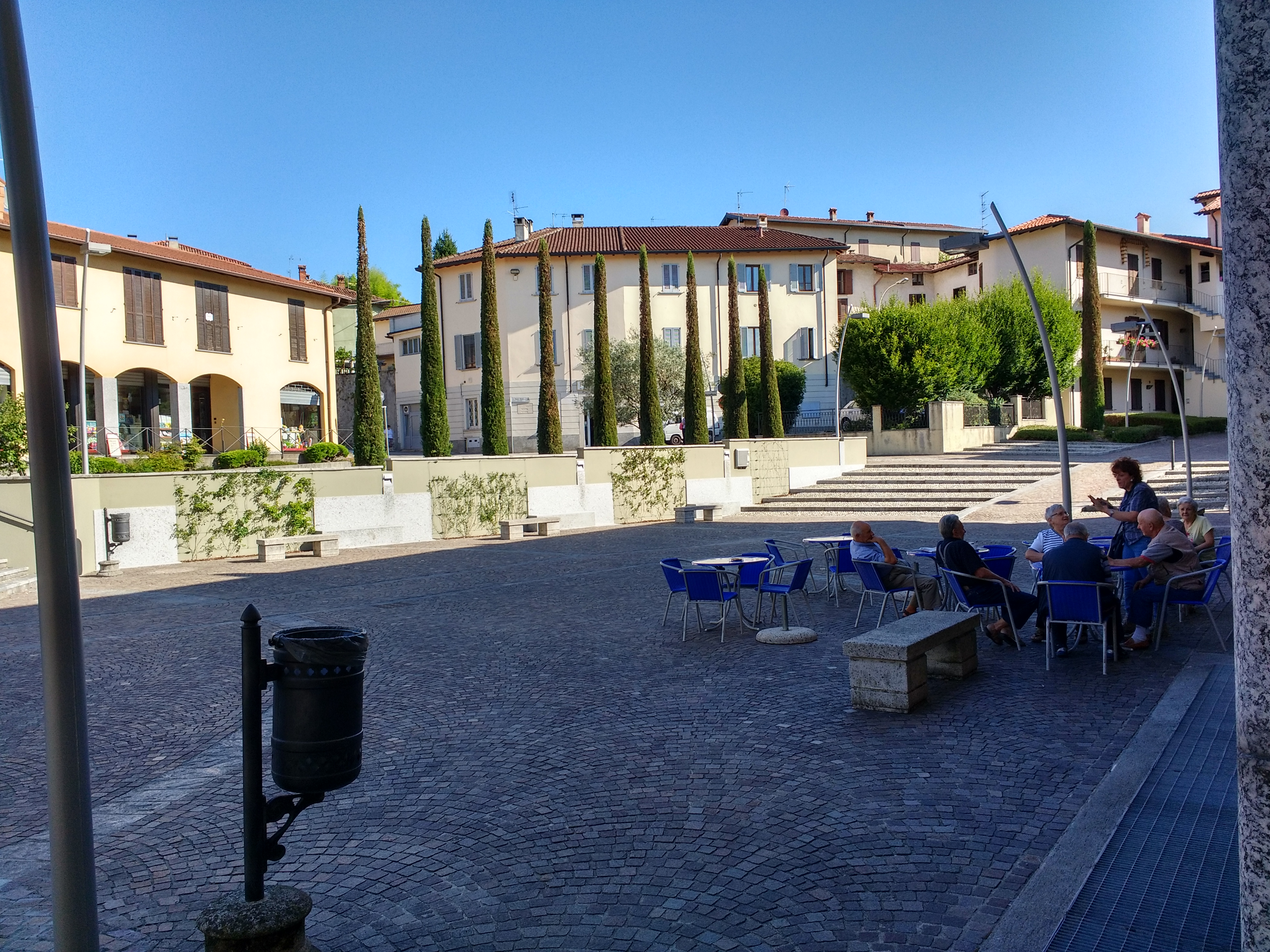 Piazza Aldo Moro nuova